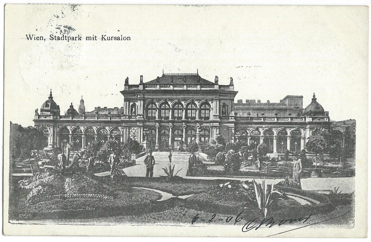 Vue de Vienne au début du XXe siècle.